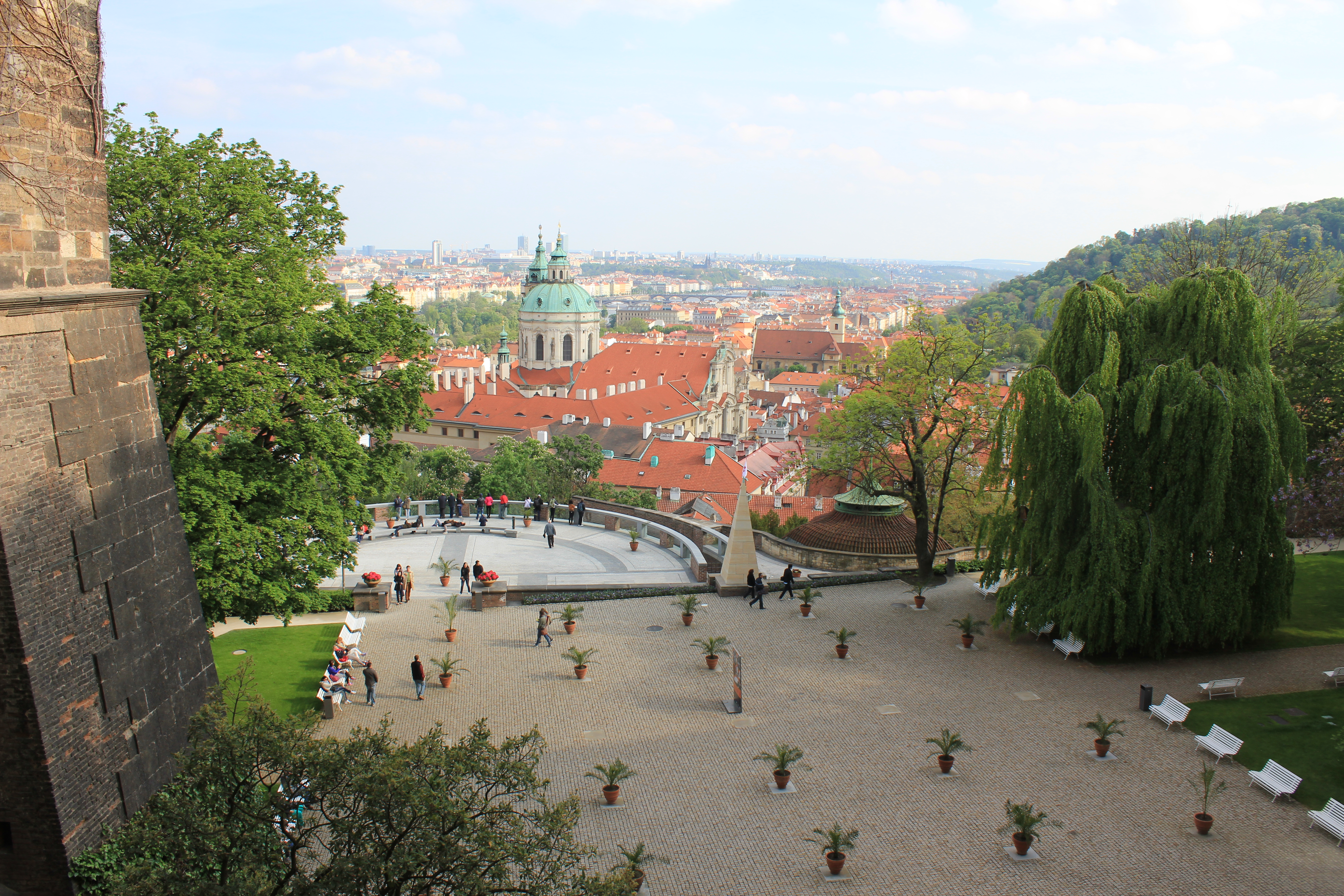 Utsyn fra Prahaborgen.